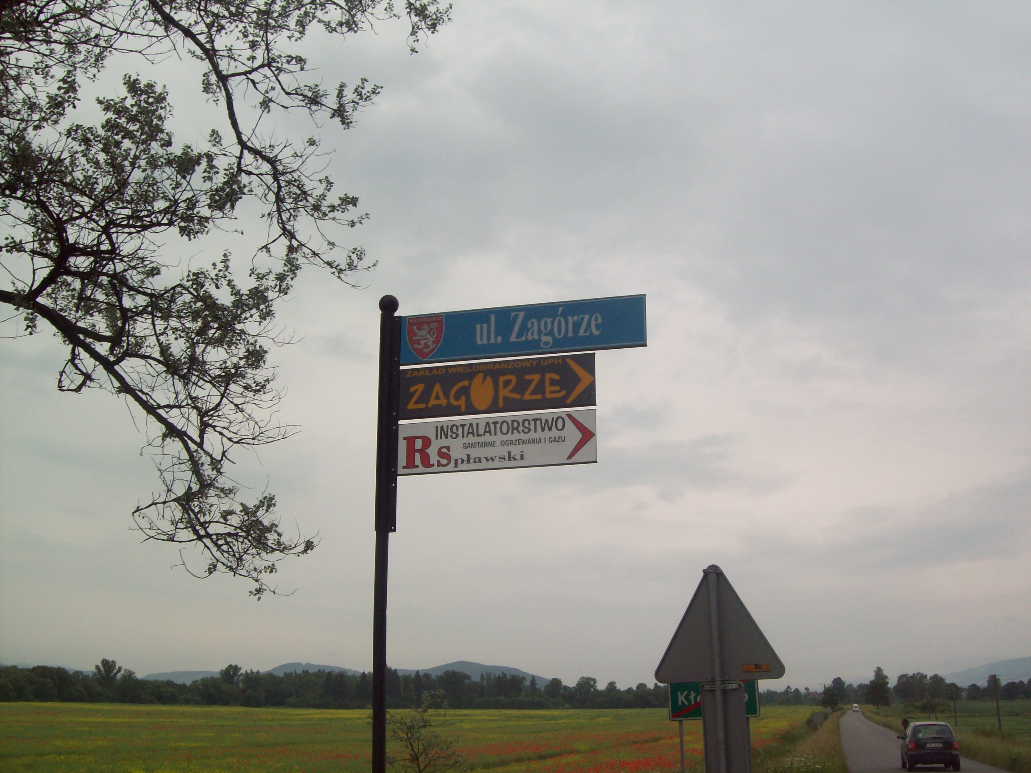 Tablica z ulicą Zagórze